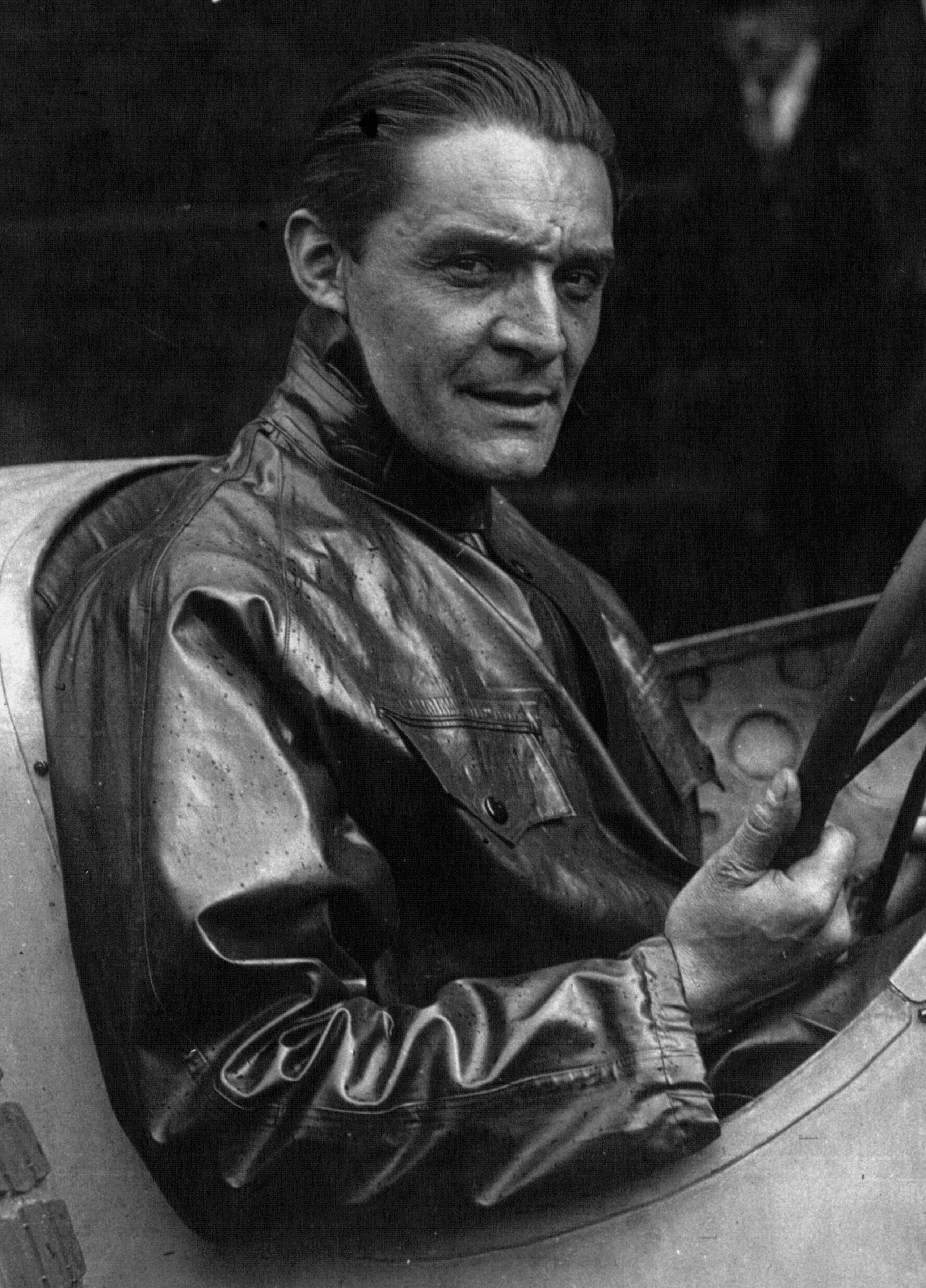 Robert Benoist au volant de sa Delage victorieuse à Monza.